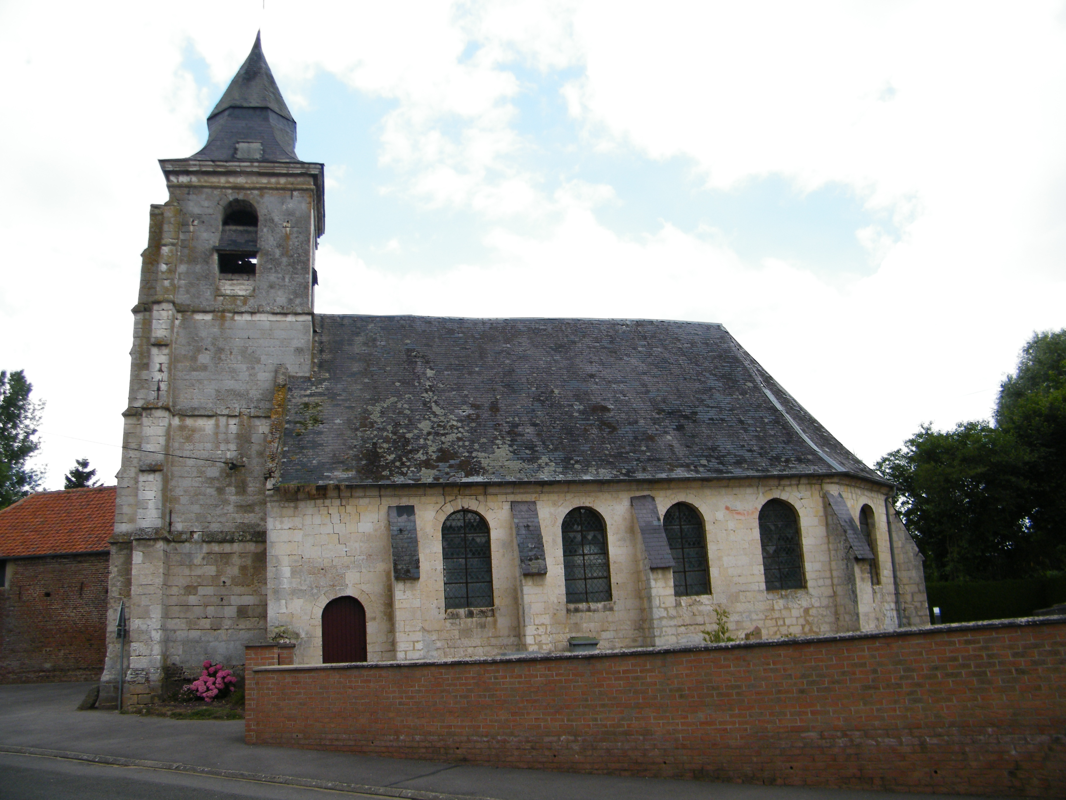 Vue transversale. L'église Saint-Médard à Saint-Hilaire, commune de Lanches-Saint-Hilaire.